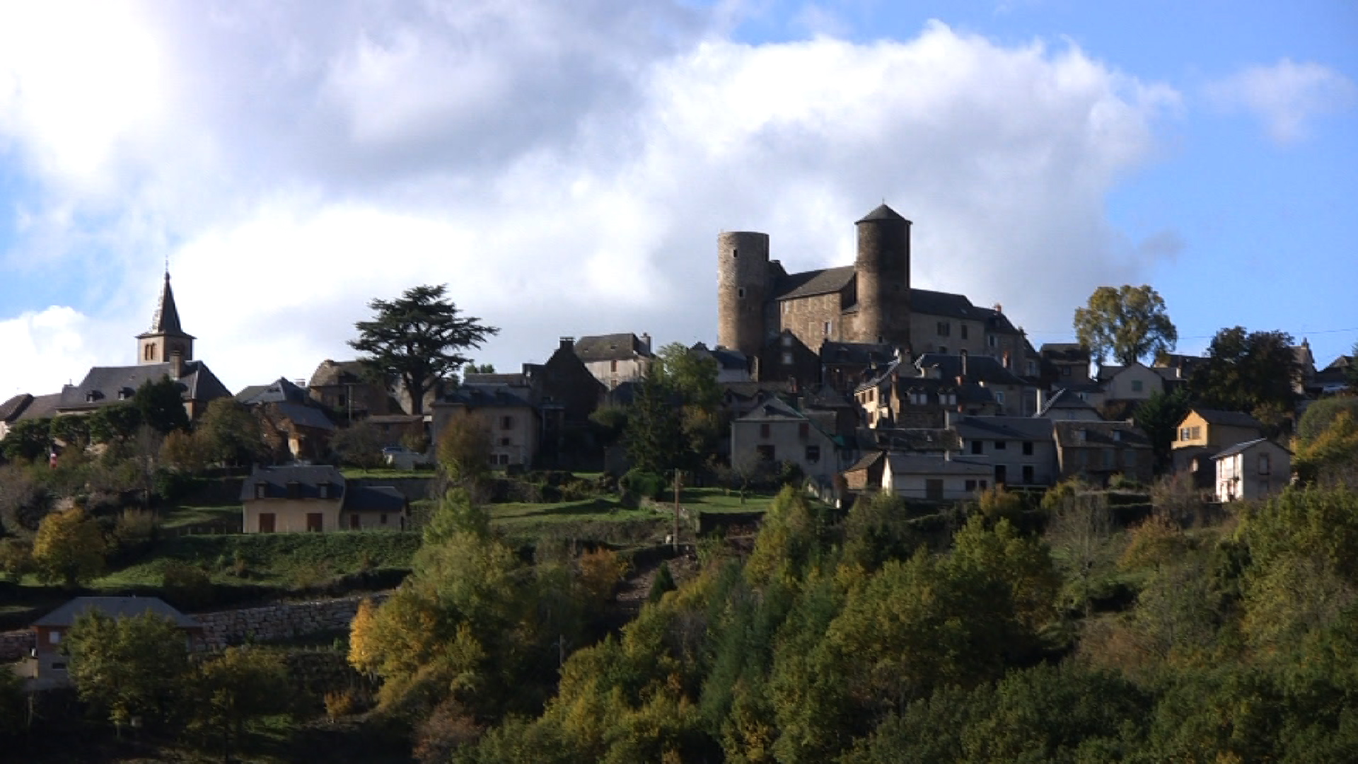 Vue générale, Pomayrols Aveyron France